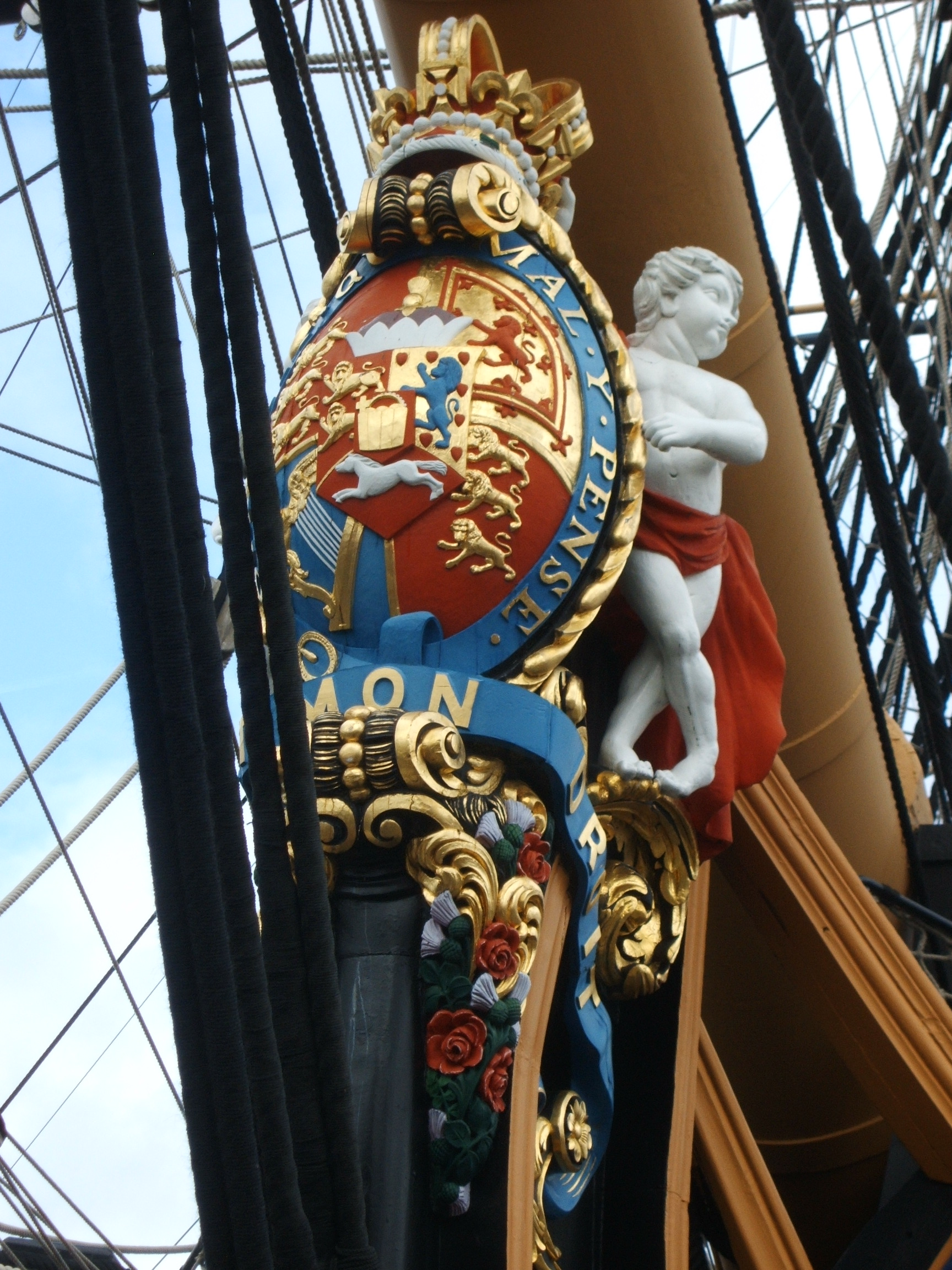 Galionsfigur der HMS Victory (1765)